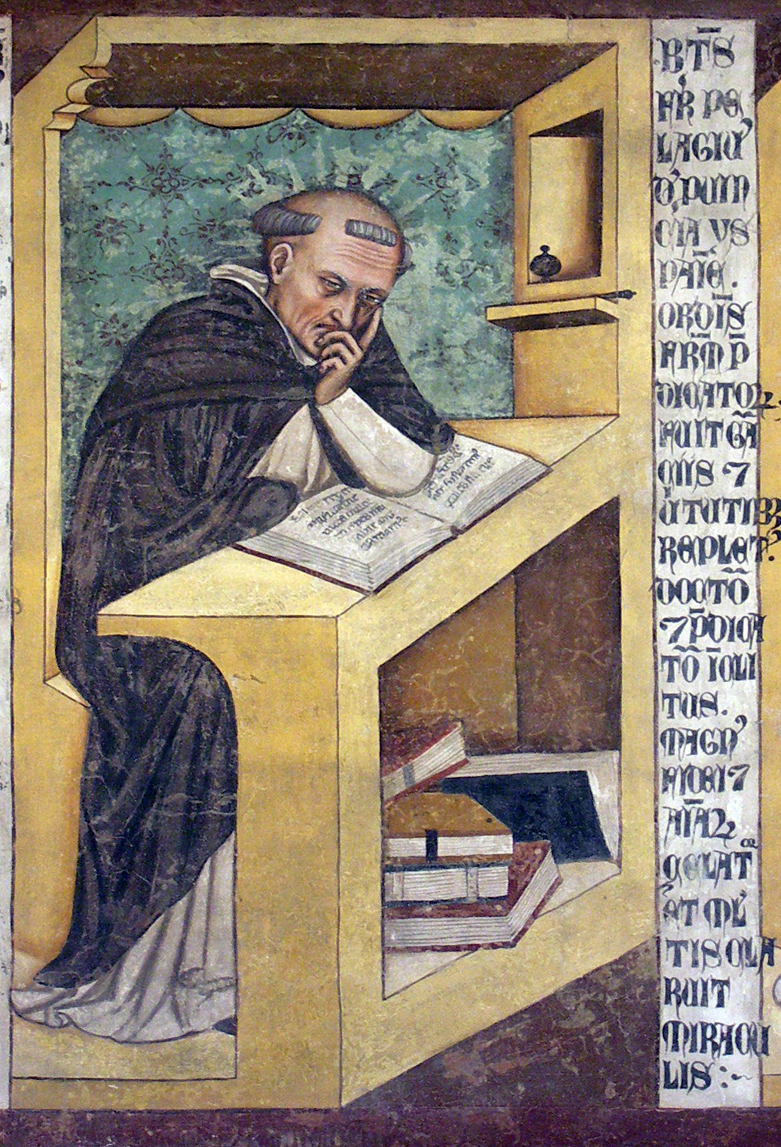 Pelagio di Spagna, serie dei Quaranta domenicani illustri, ex convento di San Niccolò, Sala del Capitolo, Treviso, 1352 (altezza di ciascun ritratto 150 cm circa)